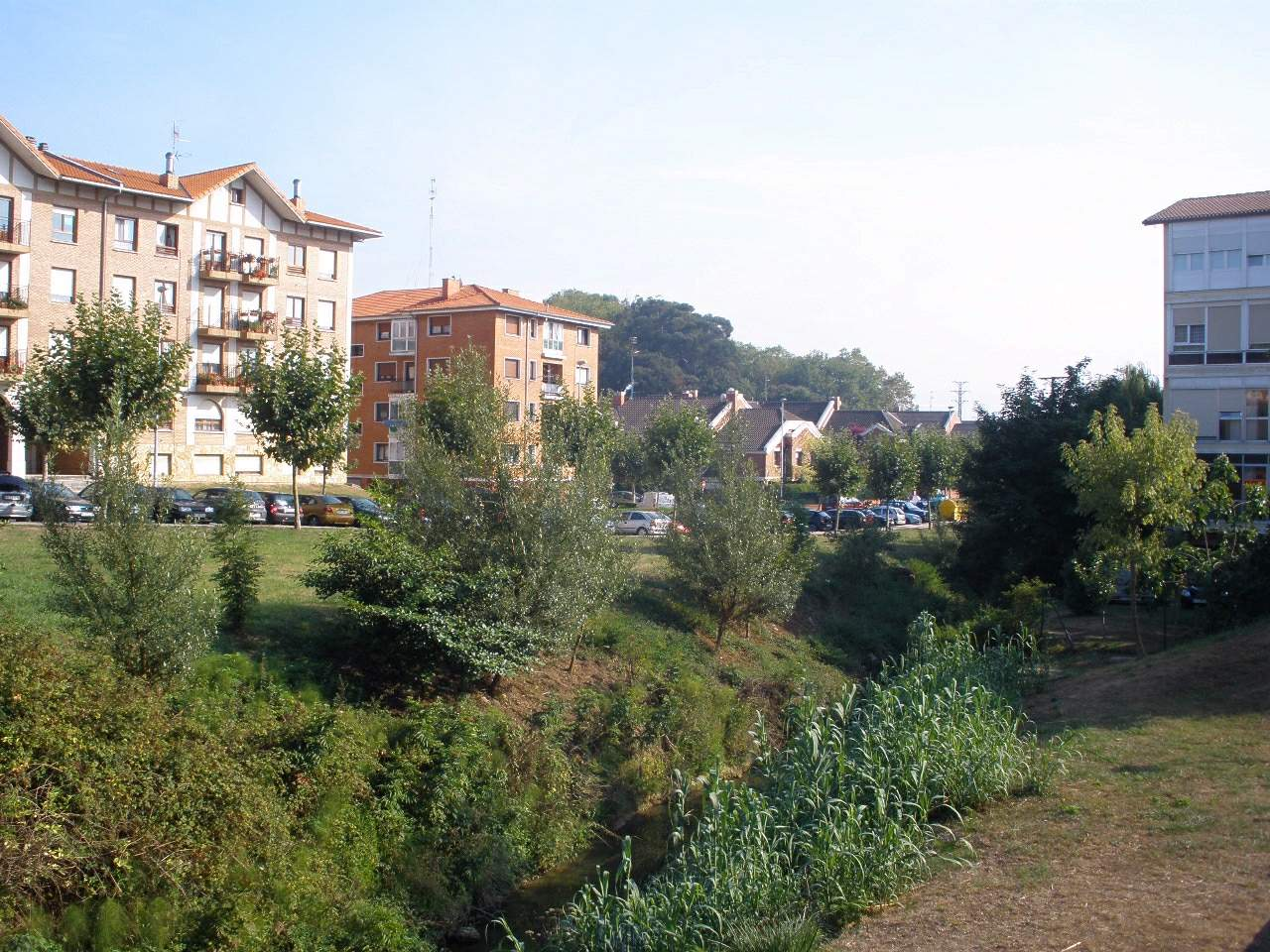 Berango (Vizcaya)